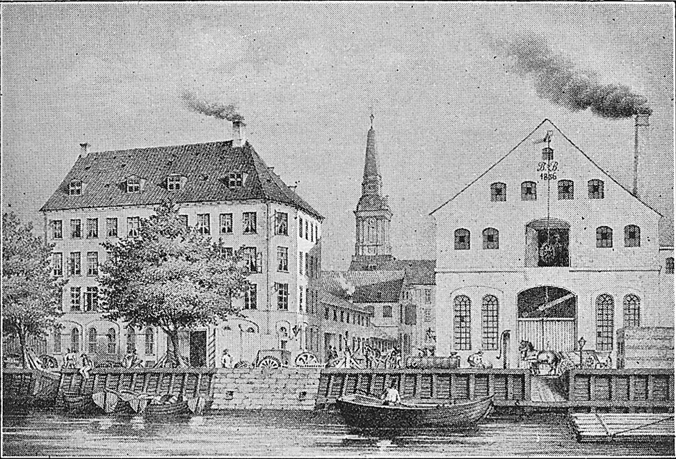 Baumgarten og Burmeisters fabrik på Christianshavn ca. 1850.